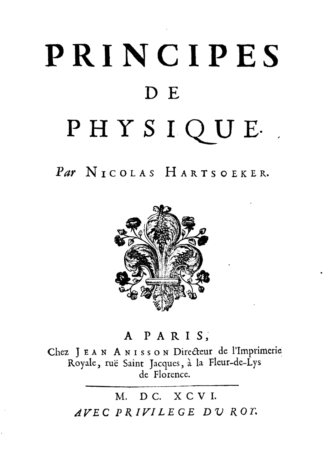 Frontespizio